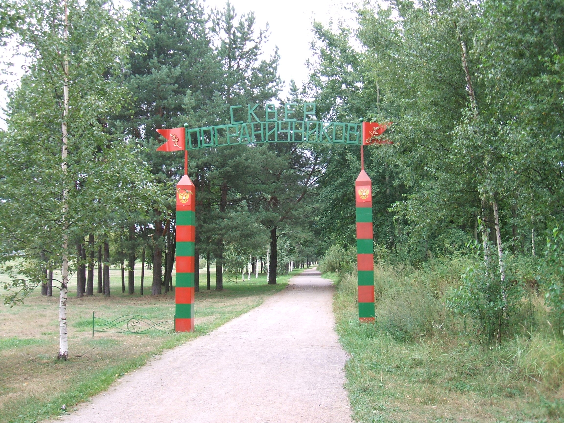 сквер Пограничников в Сестрорецке